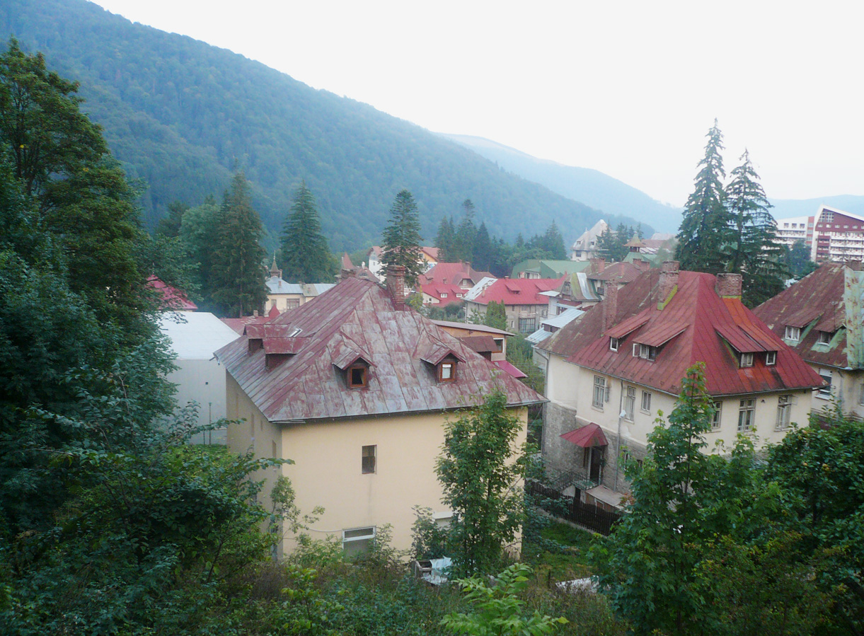 Sinaia, Romania